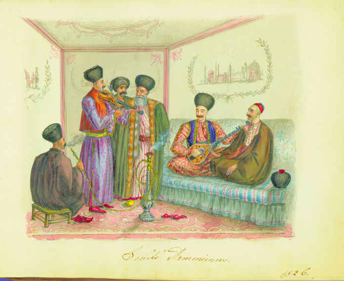 Société Armenienne